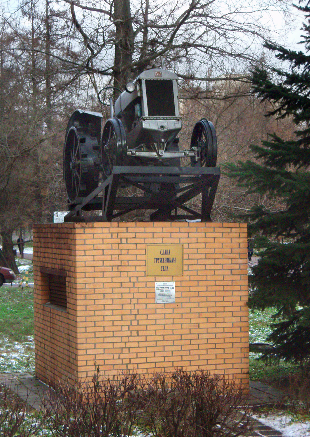 Монумент "Слава труженикам села" с трактором СХТЗ 15/30 на территории МСХА им. К. А. Тимирязева